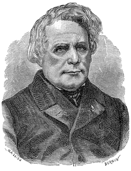 Portrait de Henry-Daniel Ruhmkorff.